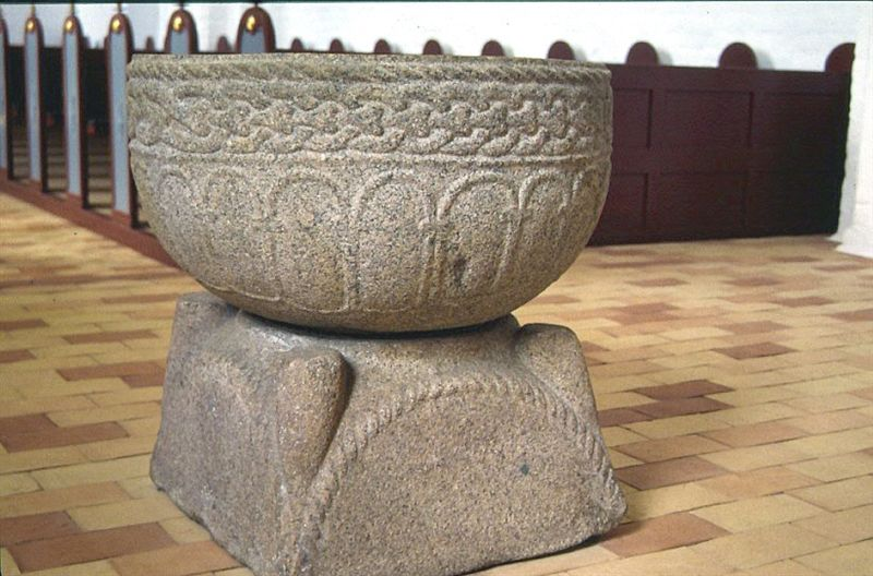 Døbefont da: Tvilum Kirke